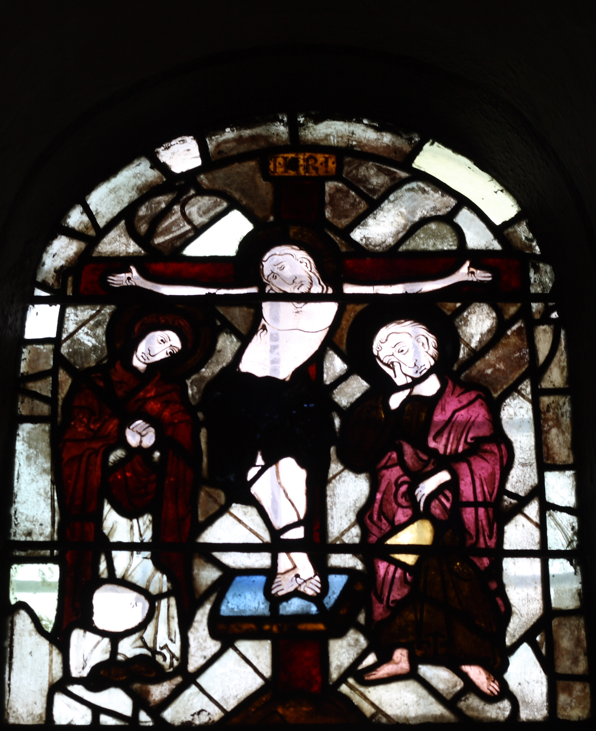 Bleiglasfenster im Chor der Kapelle St. Wendelin in Koisdorf, Darstellung: Kreuzigung